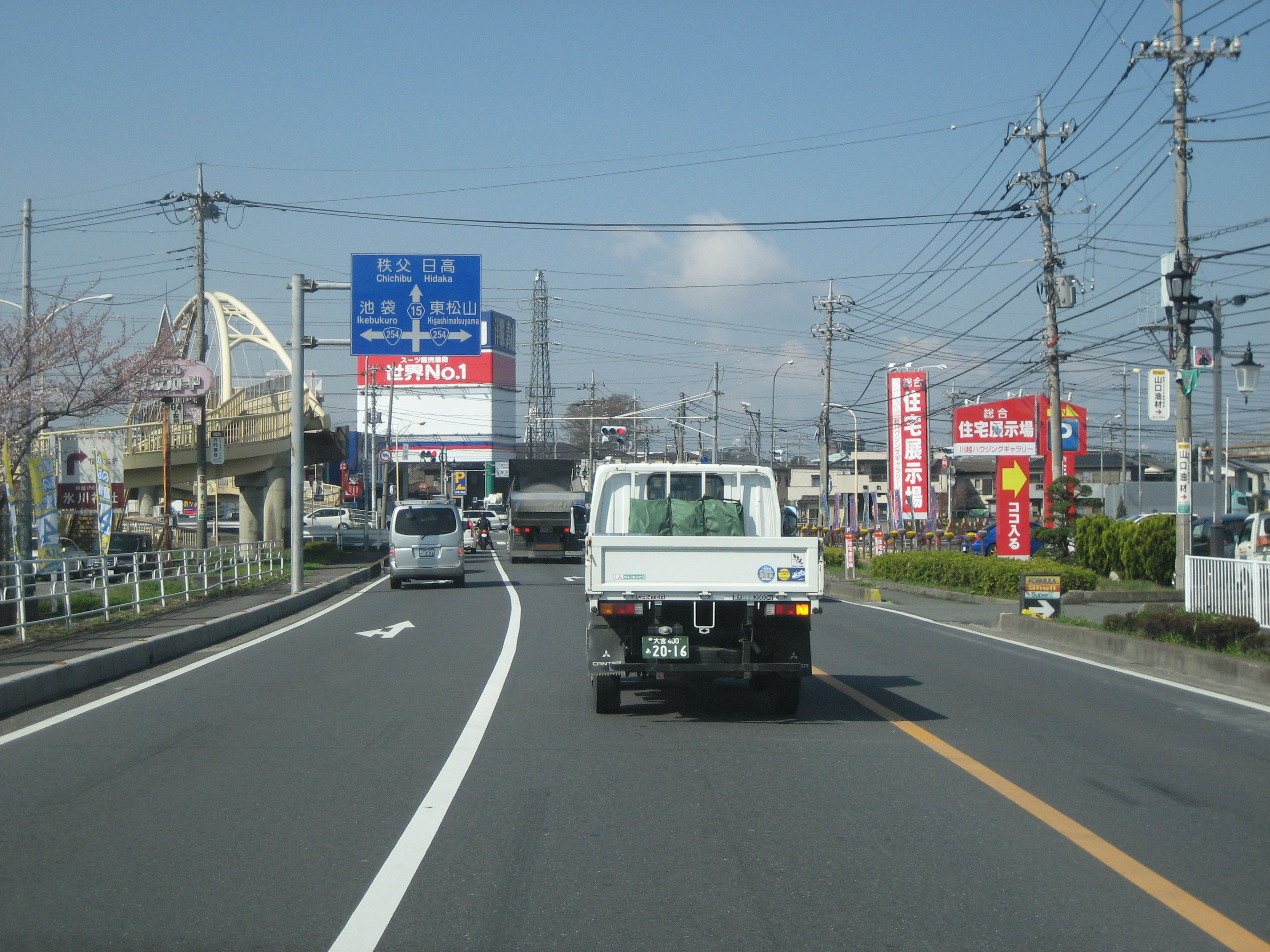 埼玉県道15号線 川越市小仙波付近